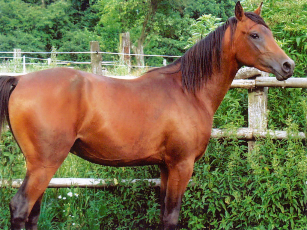 Arabischer Vollbluthengst Pernod Al Ariba, 3 jährig